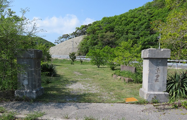 旧・鈴江小学校（対馬市）